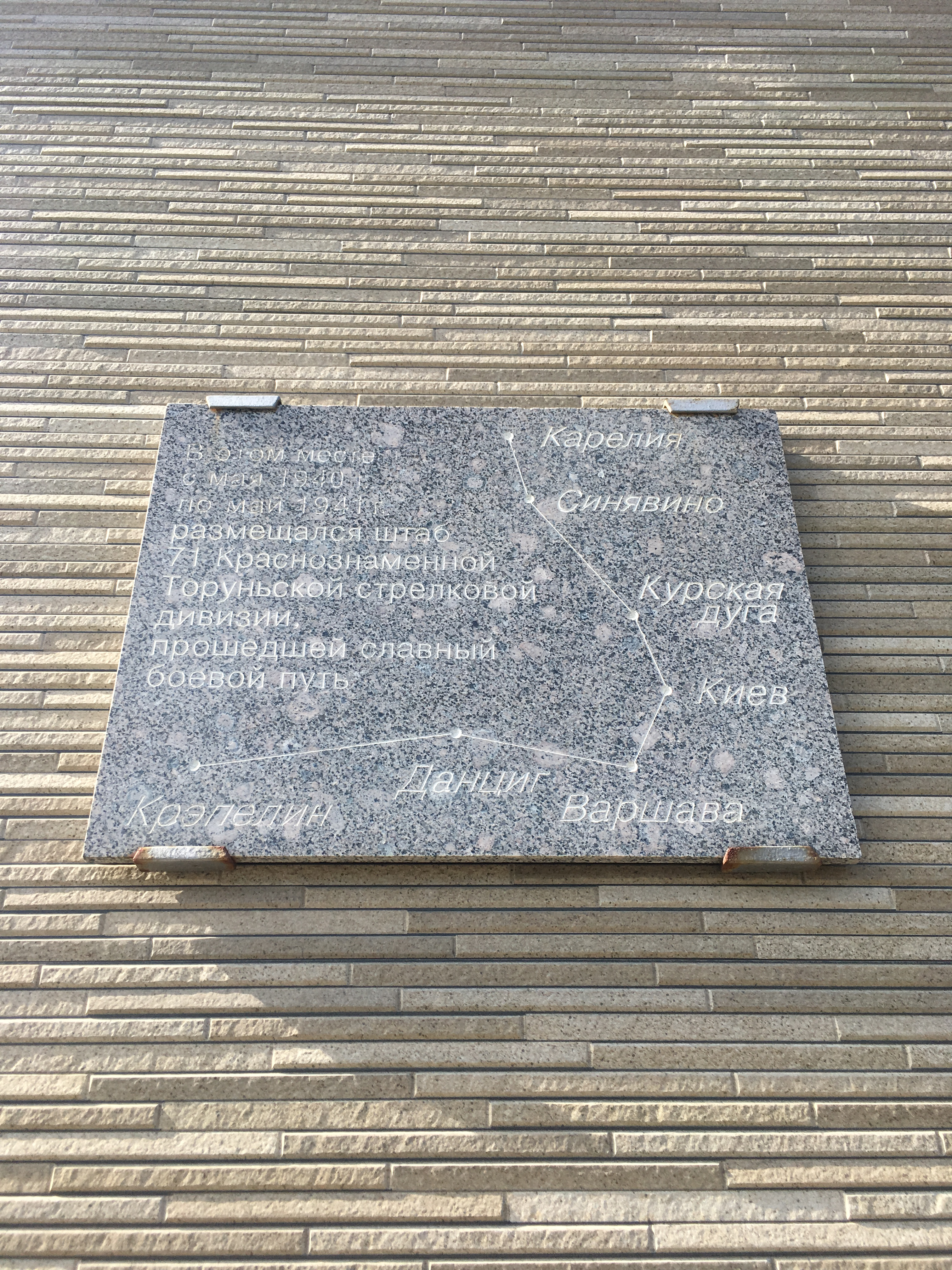 В этом месте с мая 1940 по май 1941 размещался штаб 71 Краснознамённой Торуньской стрелковой дивизии, прошедшей славный боевой путь.